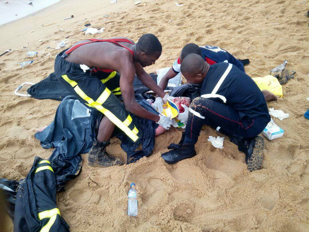 Des pompiers assistant un survivant du crash d’avion au bord de la mer au Port Bouet, au large d’Abidjan, Côte d’ivoire, 14 octobre 2017. (VOA/Narita Namasté)